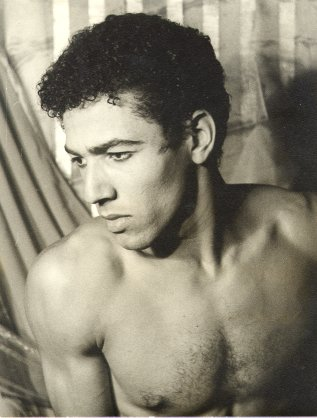 Francisco Moncion